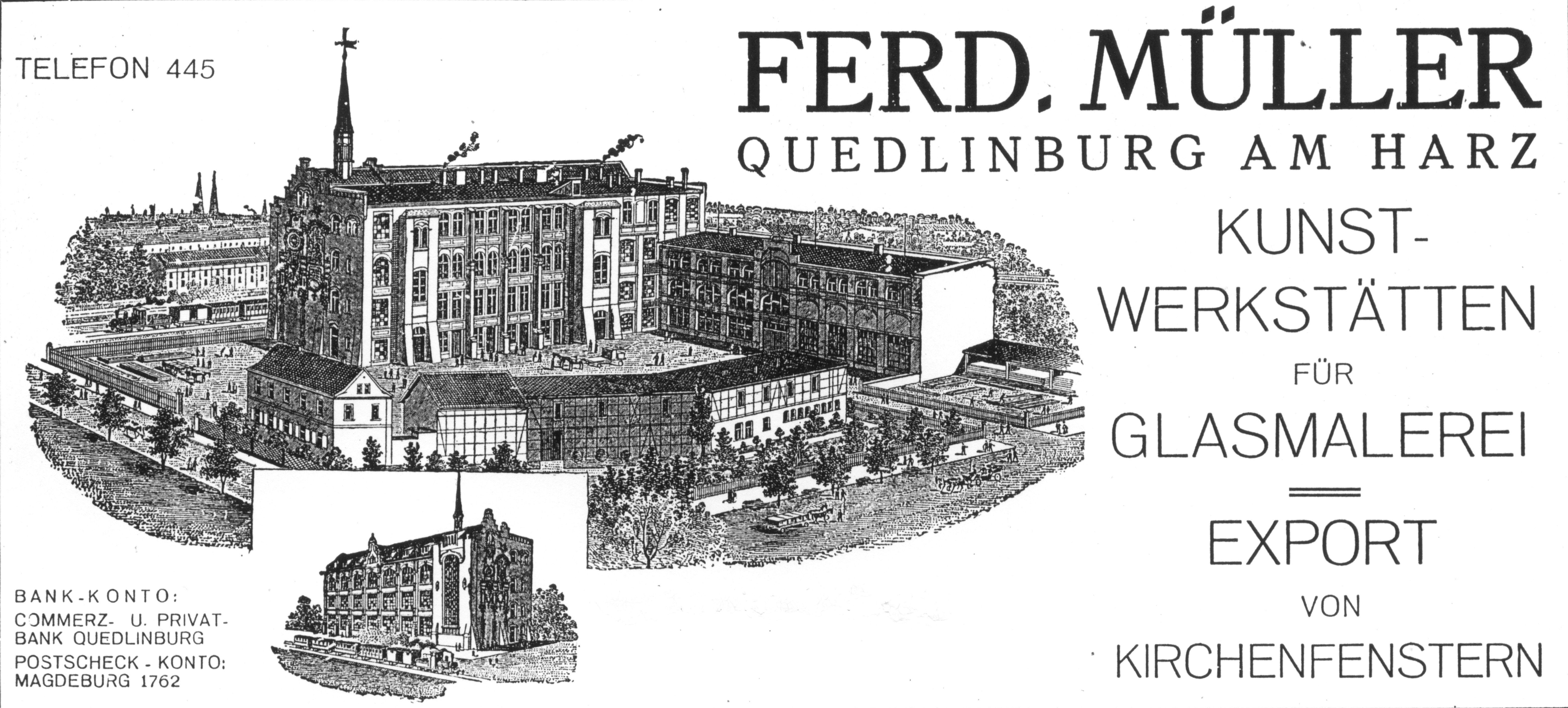 Briefkopf der Glasmalereimanufaktur Ferdiand Müller, Quedlinburg 1900